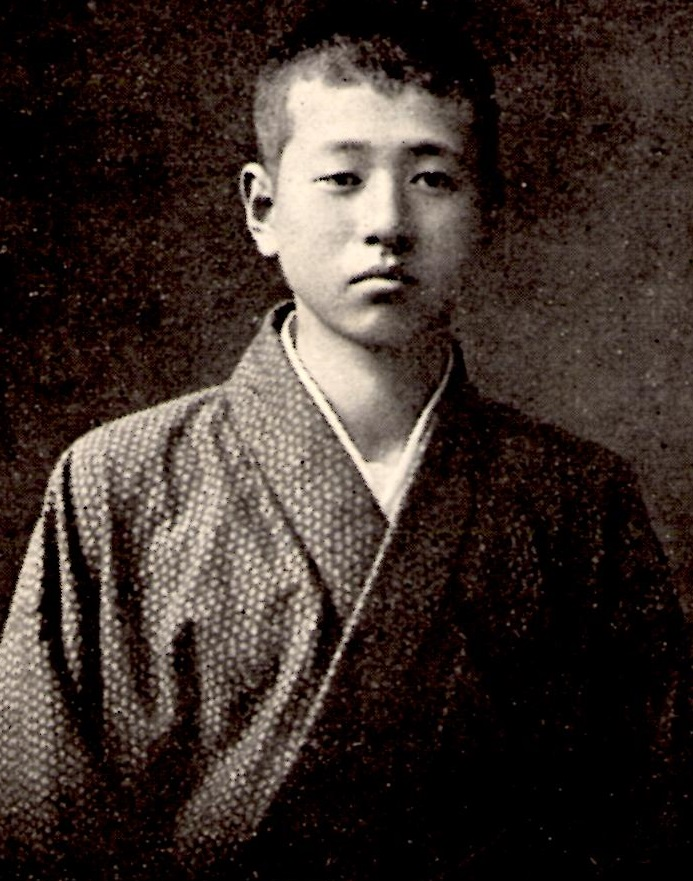 昭和26年に刊行された『富永太郎詩集』（創元文庫）に掲載された画像。